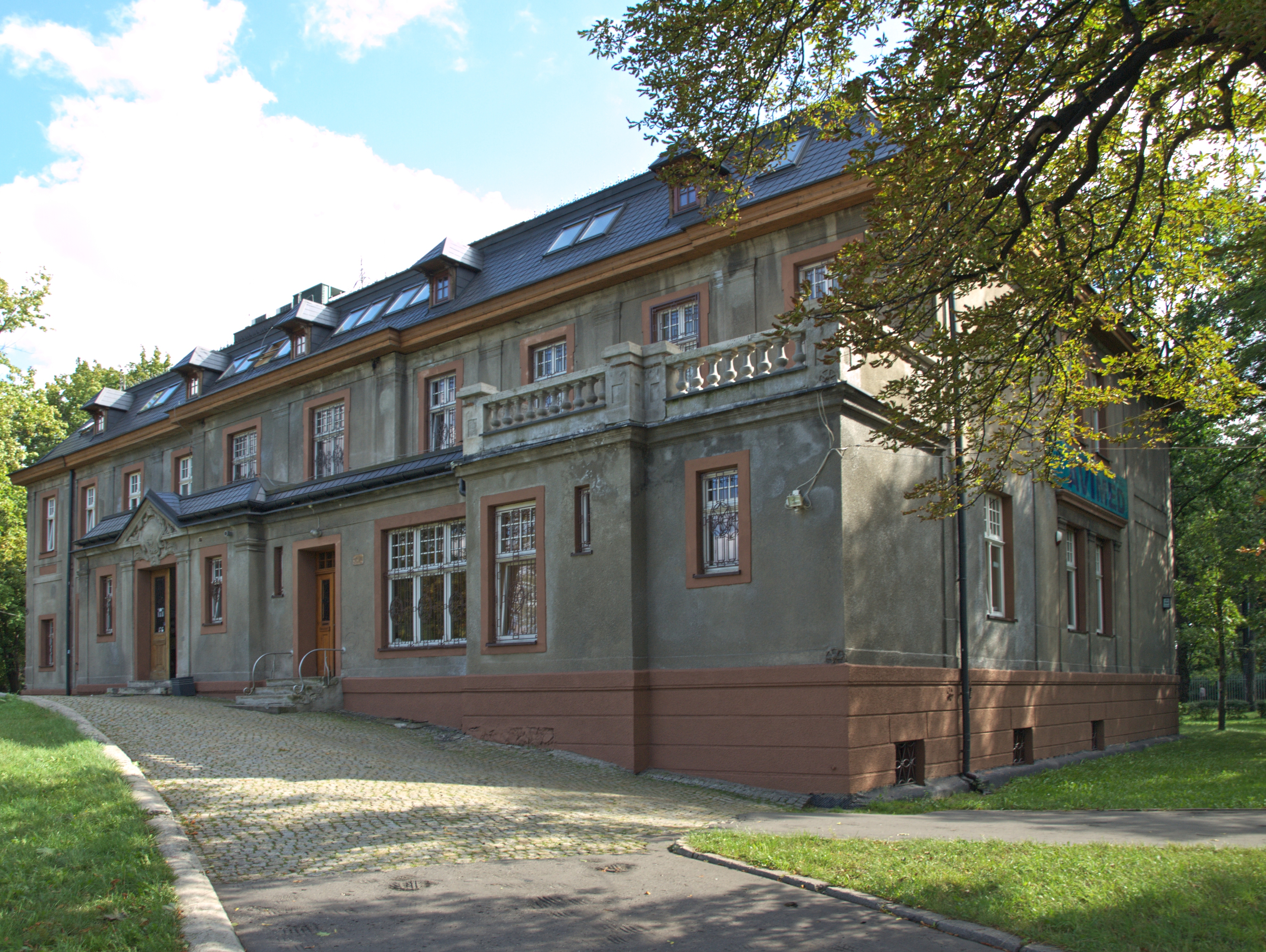 Katowice, ul. Gliwicka 159 - budynek dworski dawnego folwarku z 1886 roku, tzw. Pałac w Załężu (zabytek nr A/1473/92)